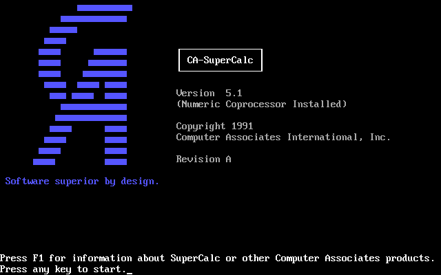 Загрузочный экран Supercalc 5